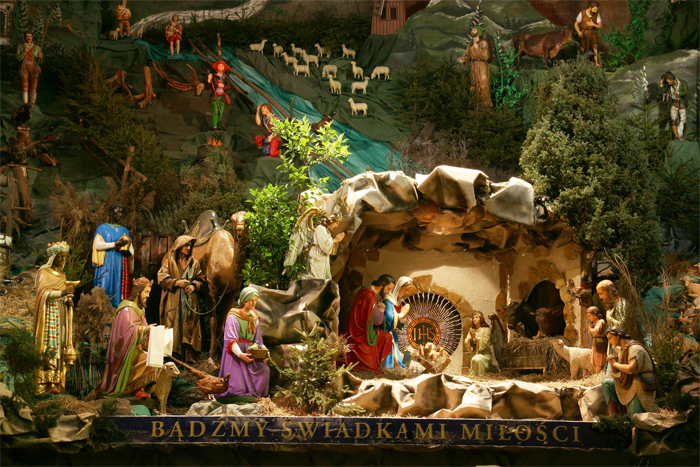 Crib in Katowice Panewniki, Poland (2009)